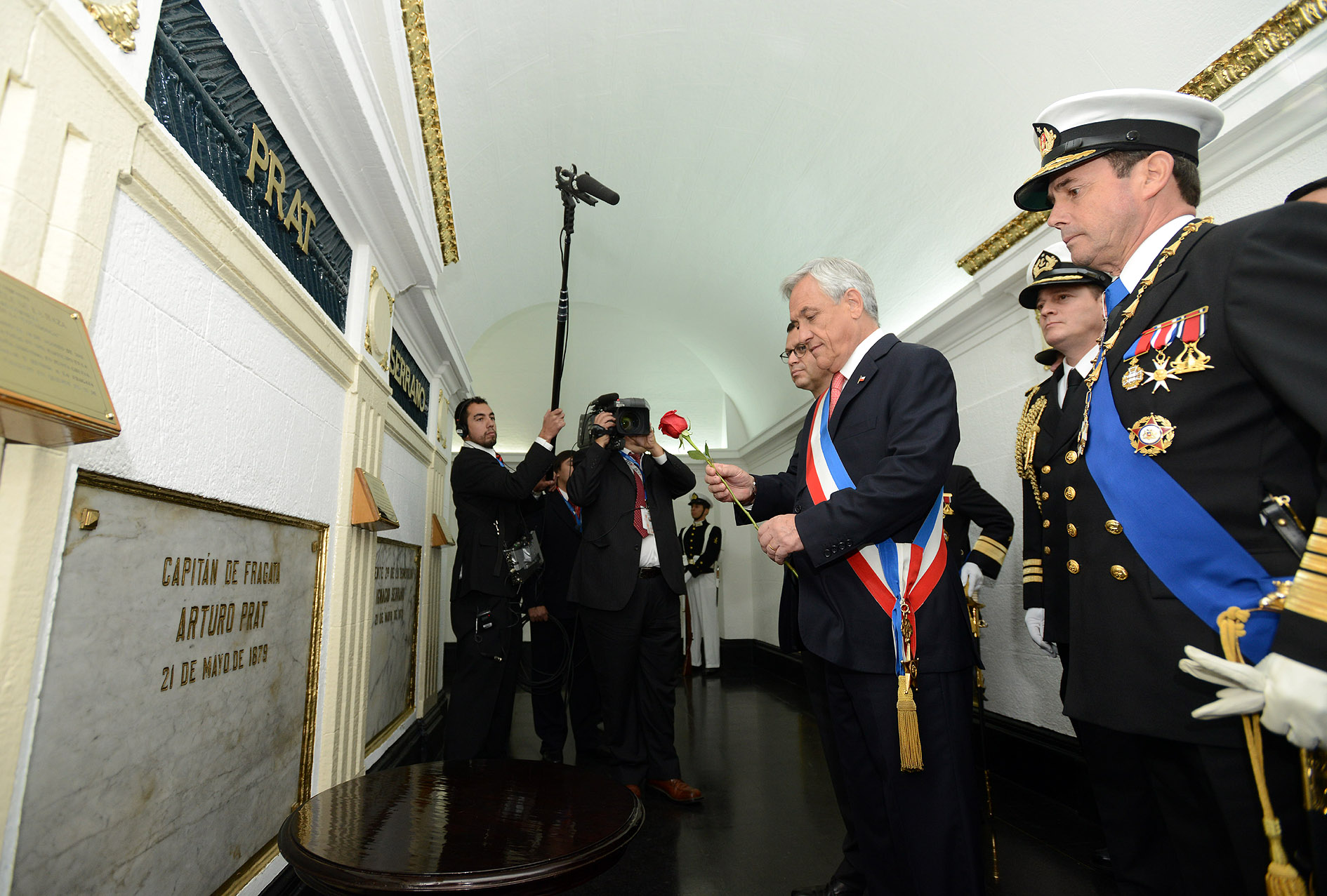 21-05-2013 134º aniversario del Combate Naval de Iquique